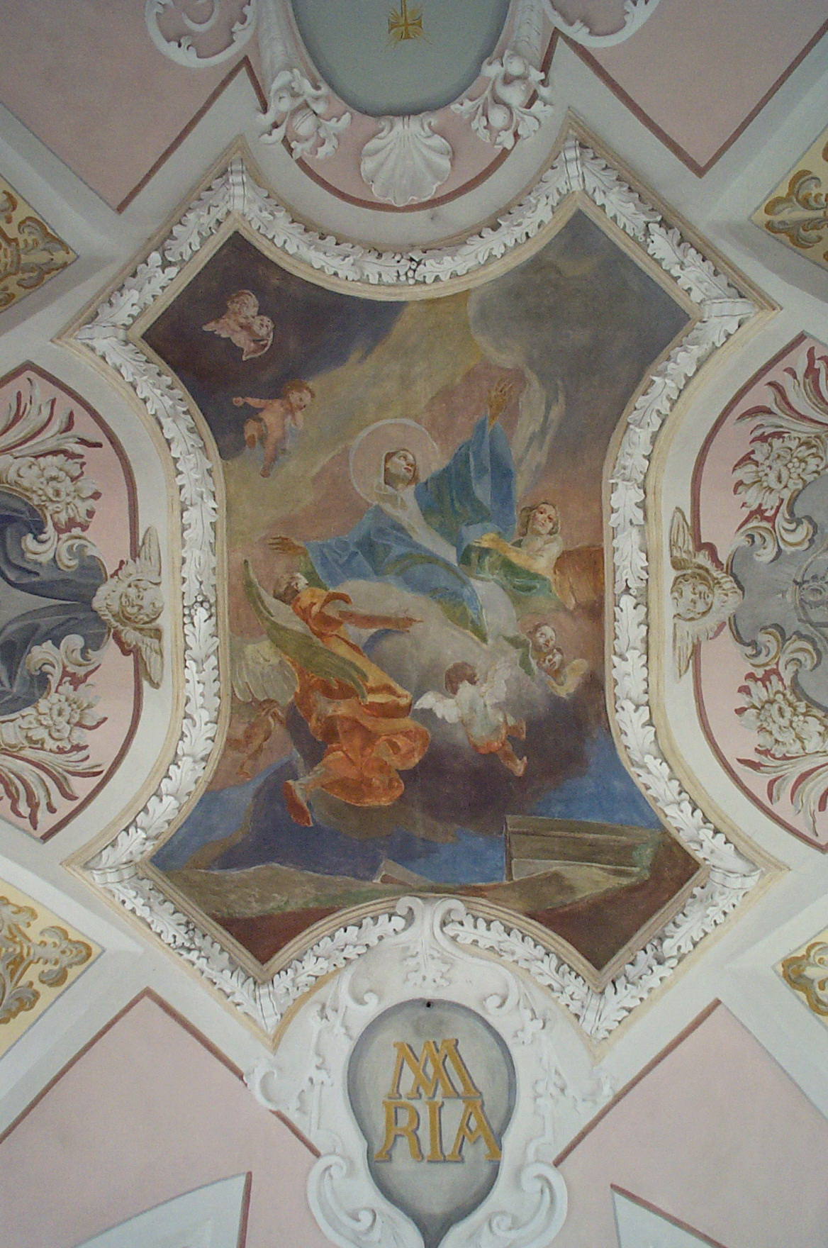 Herrngiersdorf, Semerskirchen, Am See 1. Katholische Pfarrkirche Mariä Himmelfahrt. Das moderne Deckengemälde zeigt die Aufnahme Mariens in den Himmel.